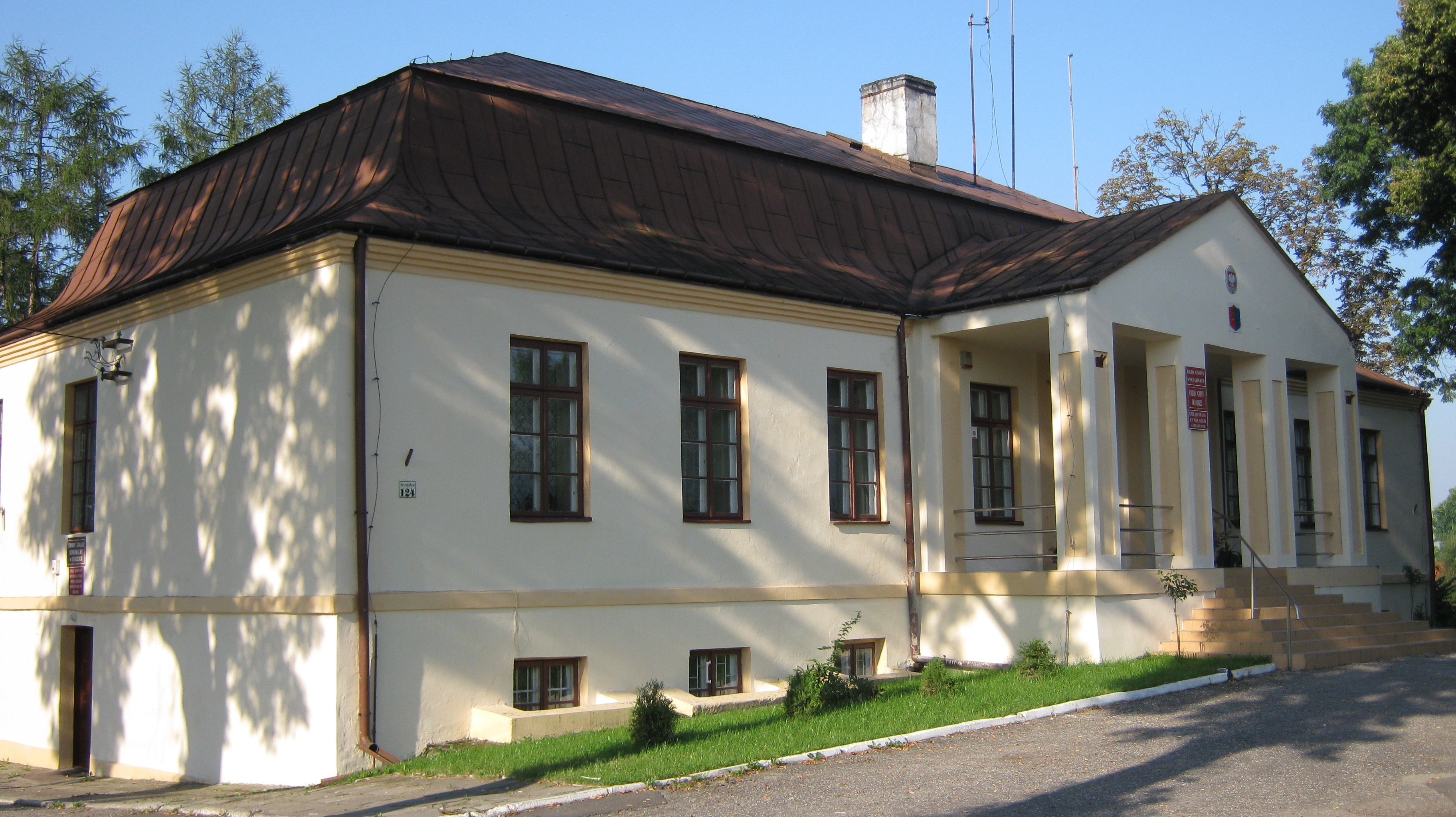 Zespół dworski – dwór i park dworski Irządze, Irządze